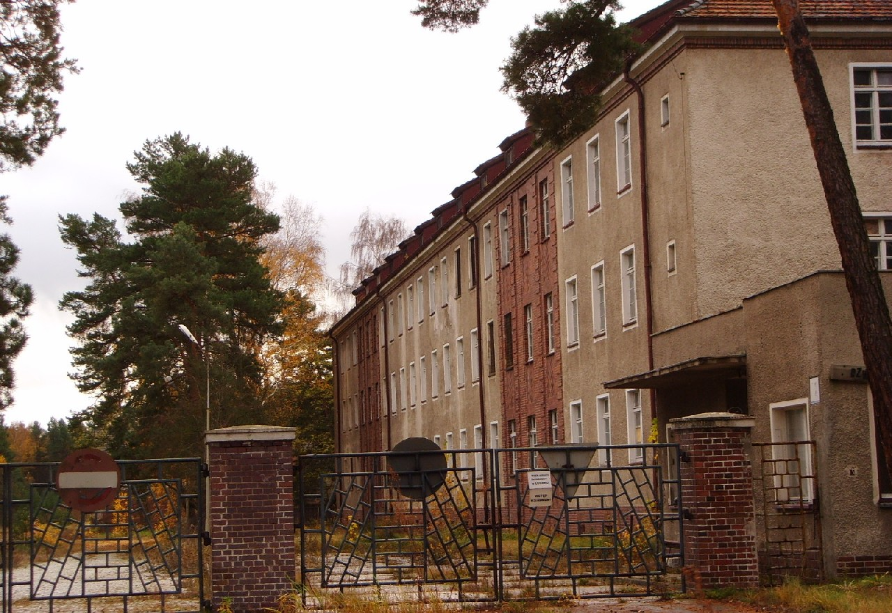 Budynek sztabu 5 batalionu zaopatrzenia z Gubina (10 lat po rozwiązaniu jednostek)